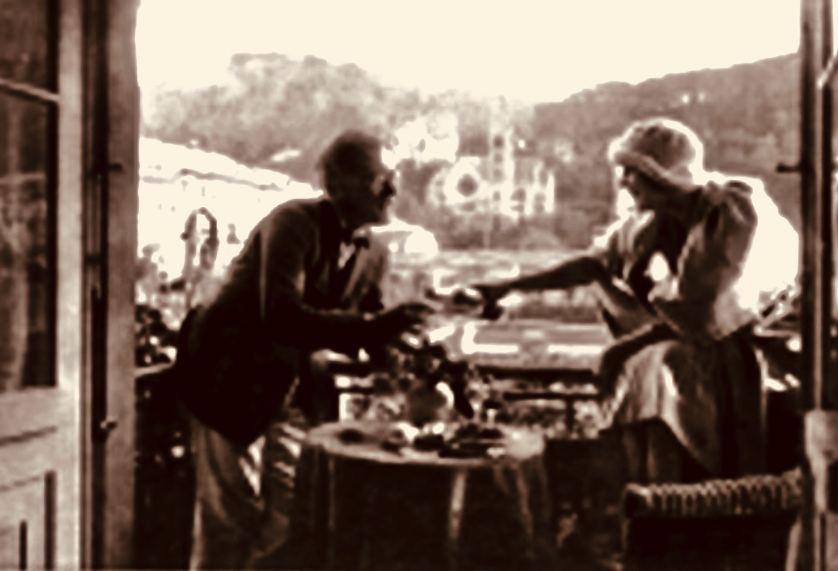 Komponist Jaap Kool (1890–1959) und Ausdrucktänzerin Grit Hegesa 1922 in Bad Ems.